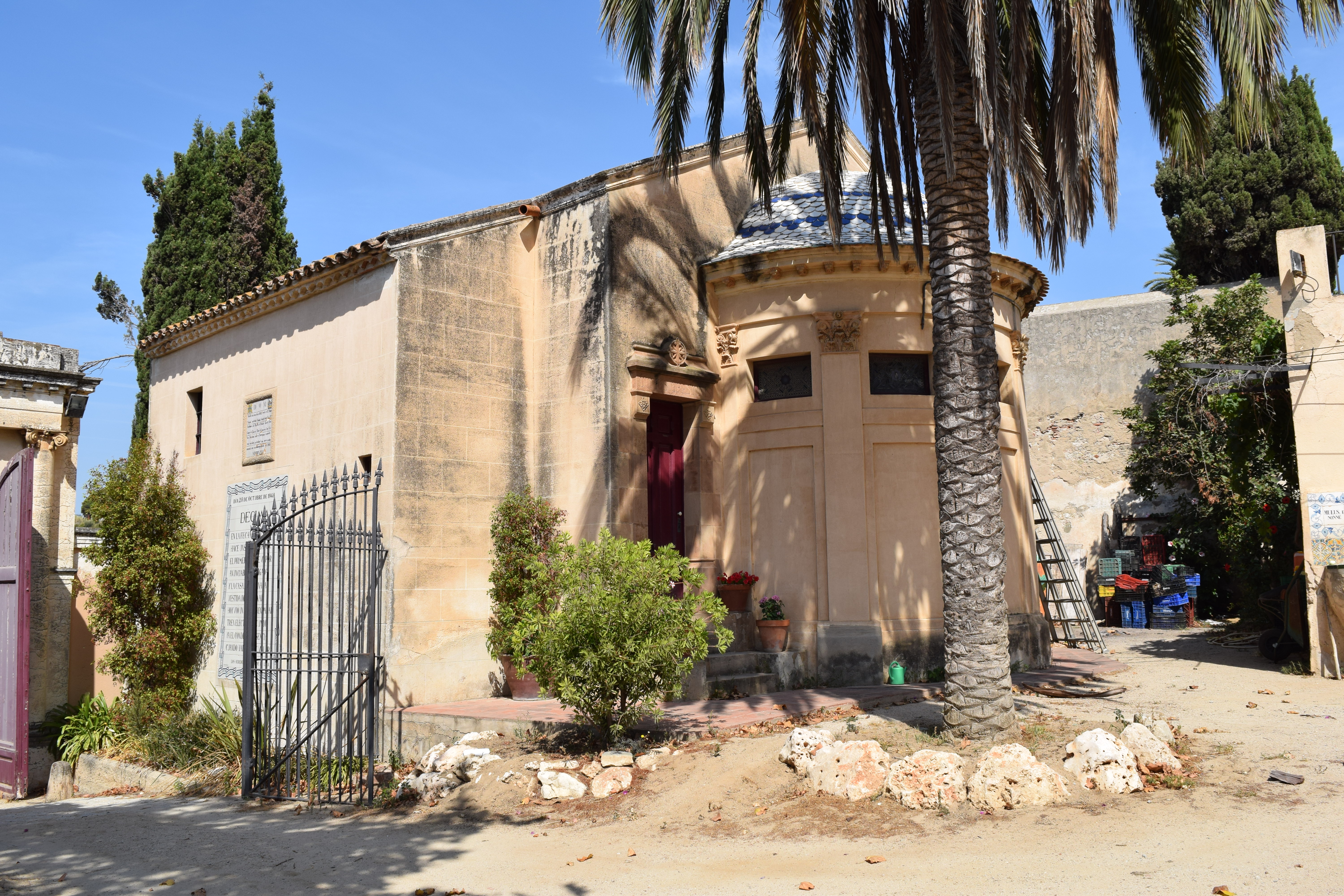 Can Teixidor (el Masnou)